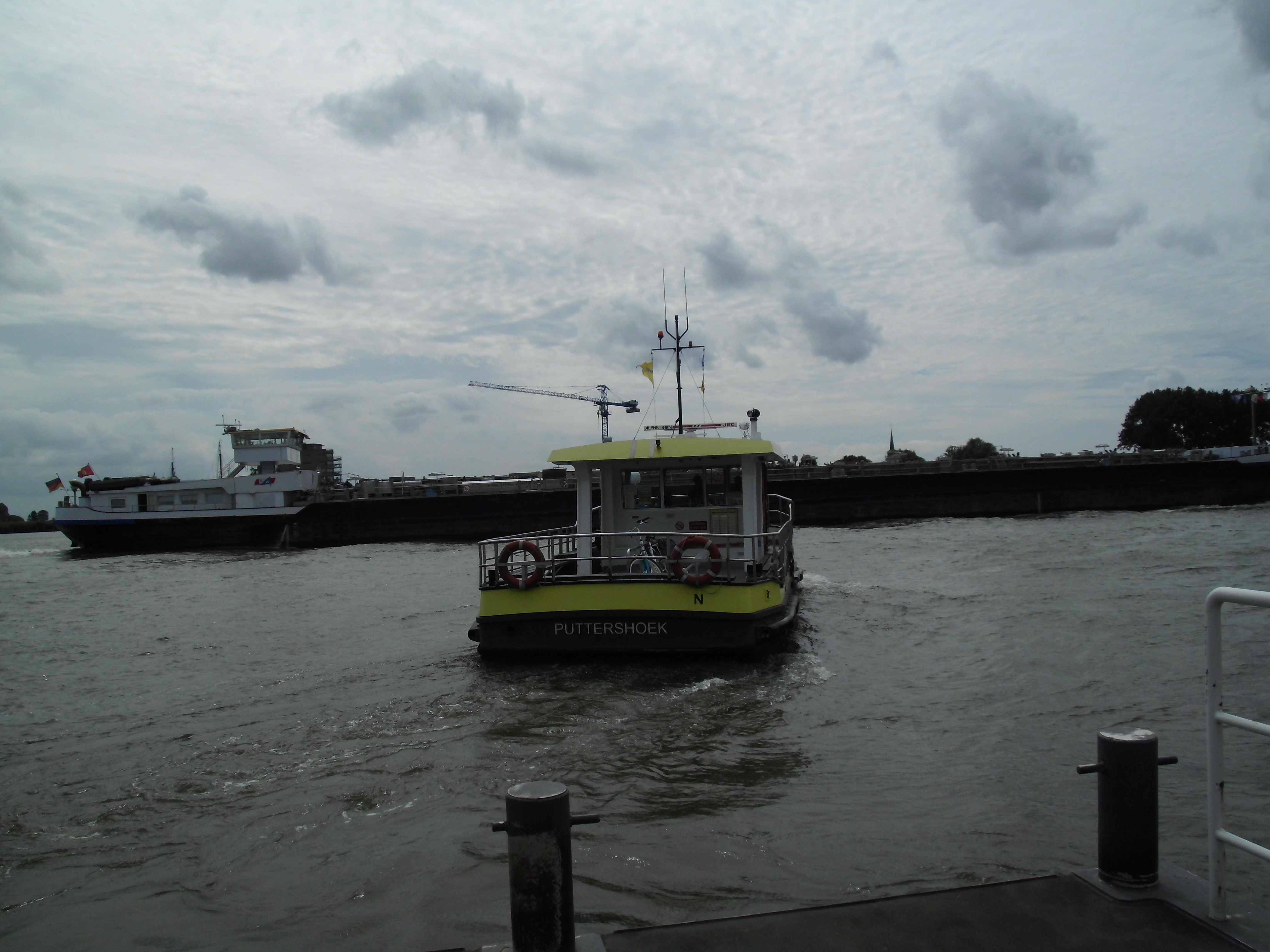 Personen- und Zweiradfähre zwischen Groote Lindt (Zwijndrecht) und Puttershoek über die Oude Maas